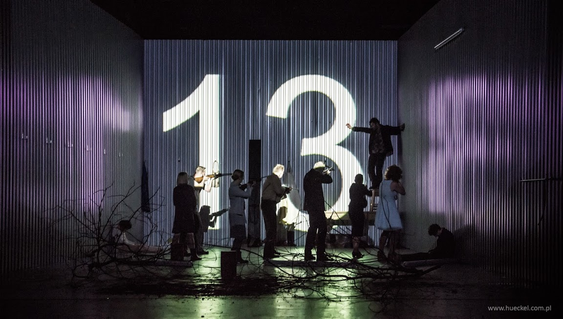 Zdjęcie z II próby generalnej. Foto: Magda Hueckel